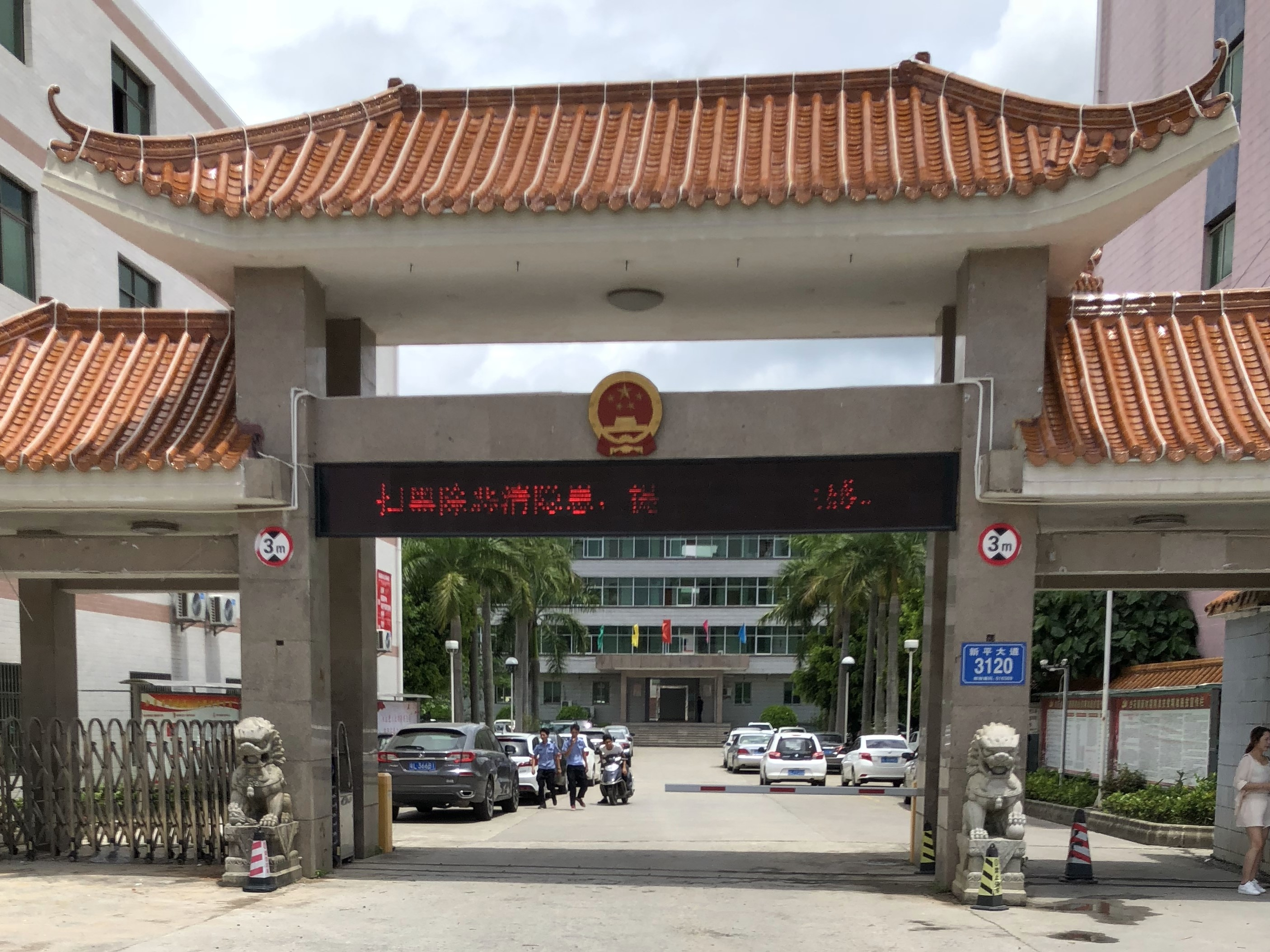 中文（中国大陆）: 白花镇政府